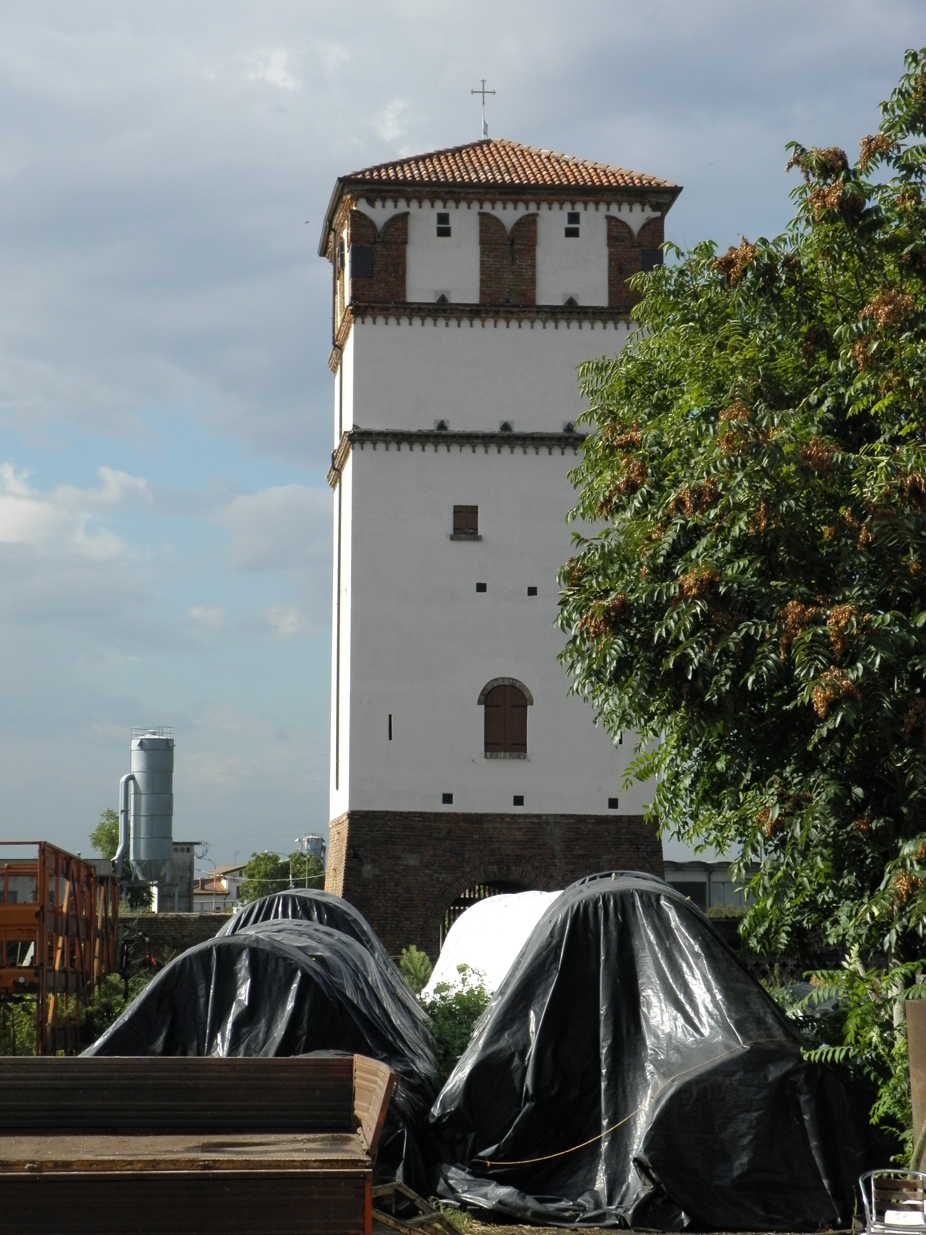 Terrazzo: la Torre medioevale, simbolo della cittadina, sita nella Corte di Villa Bottagisio Nani Mocenigo.